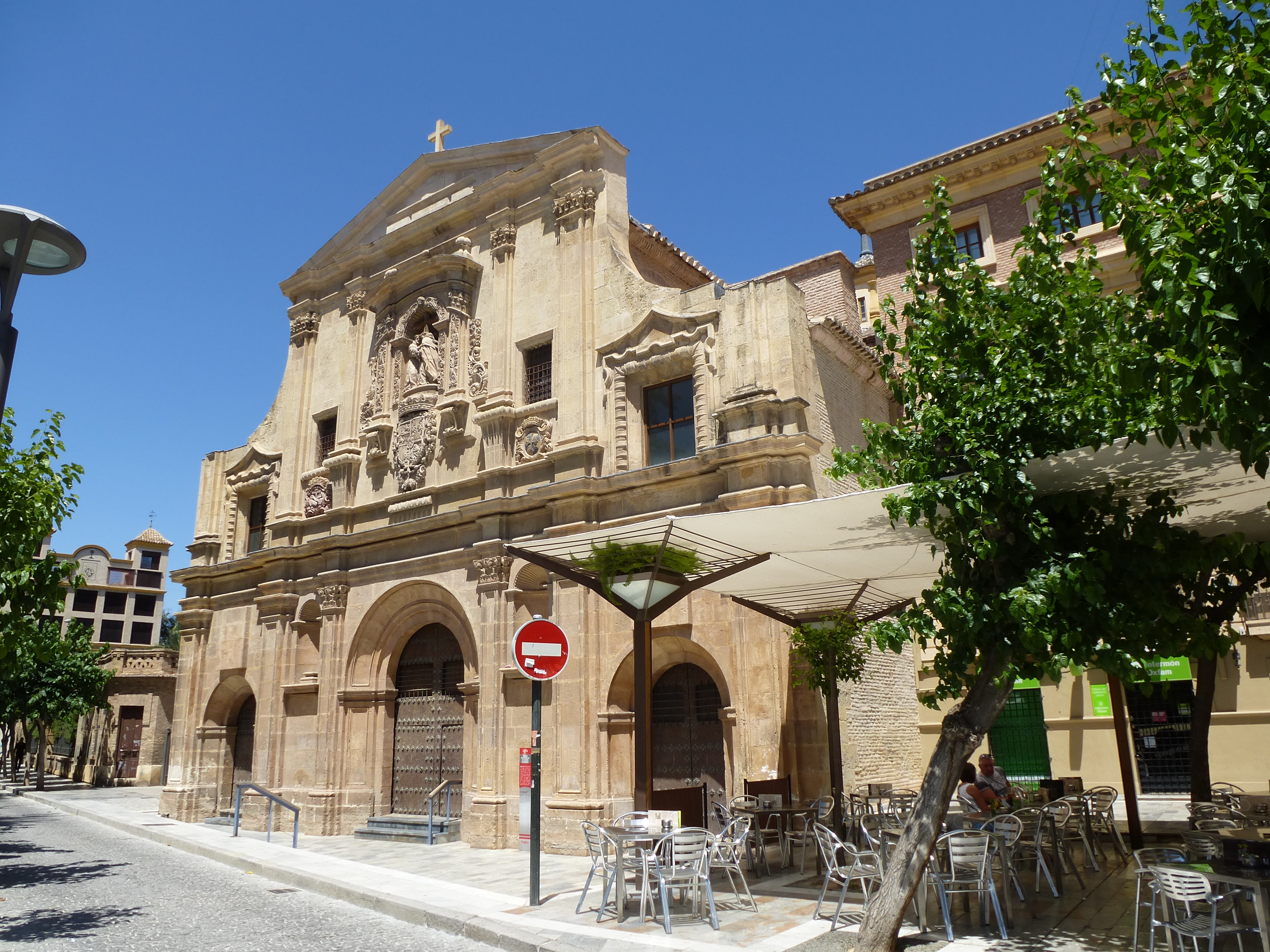 murcie